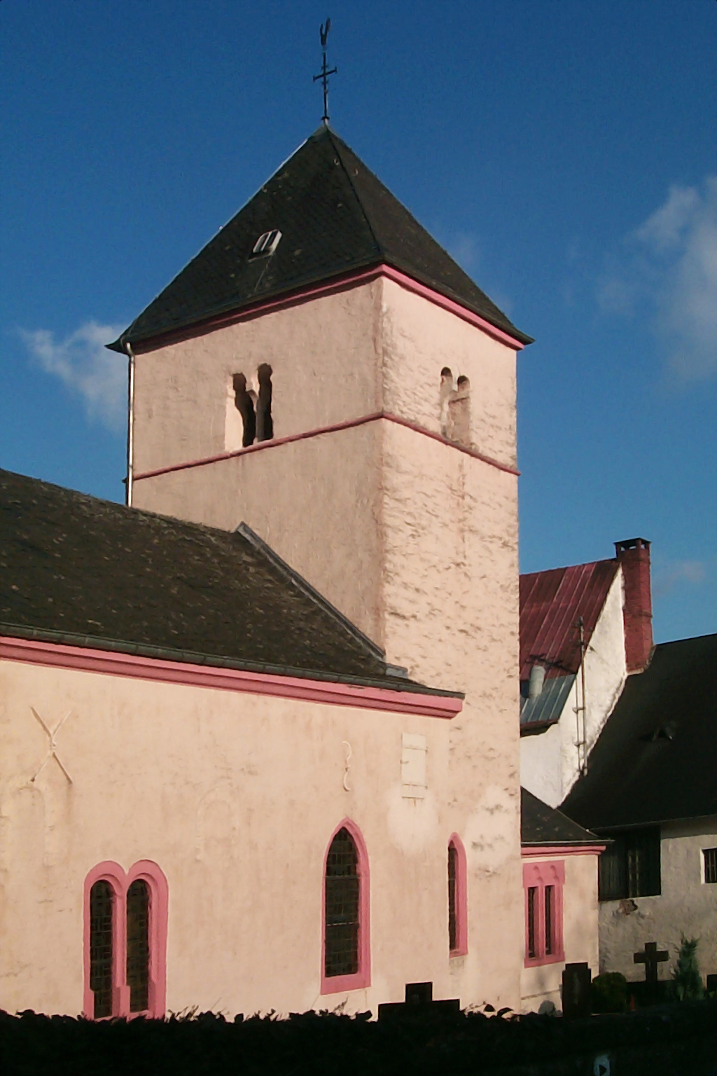 St. Sylvester (Minden (Sauer)) von Westen